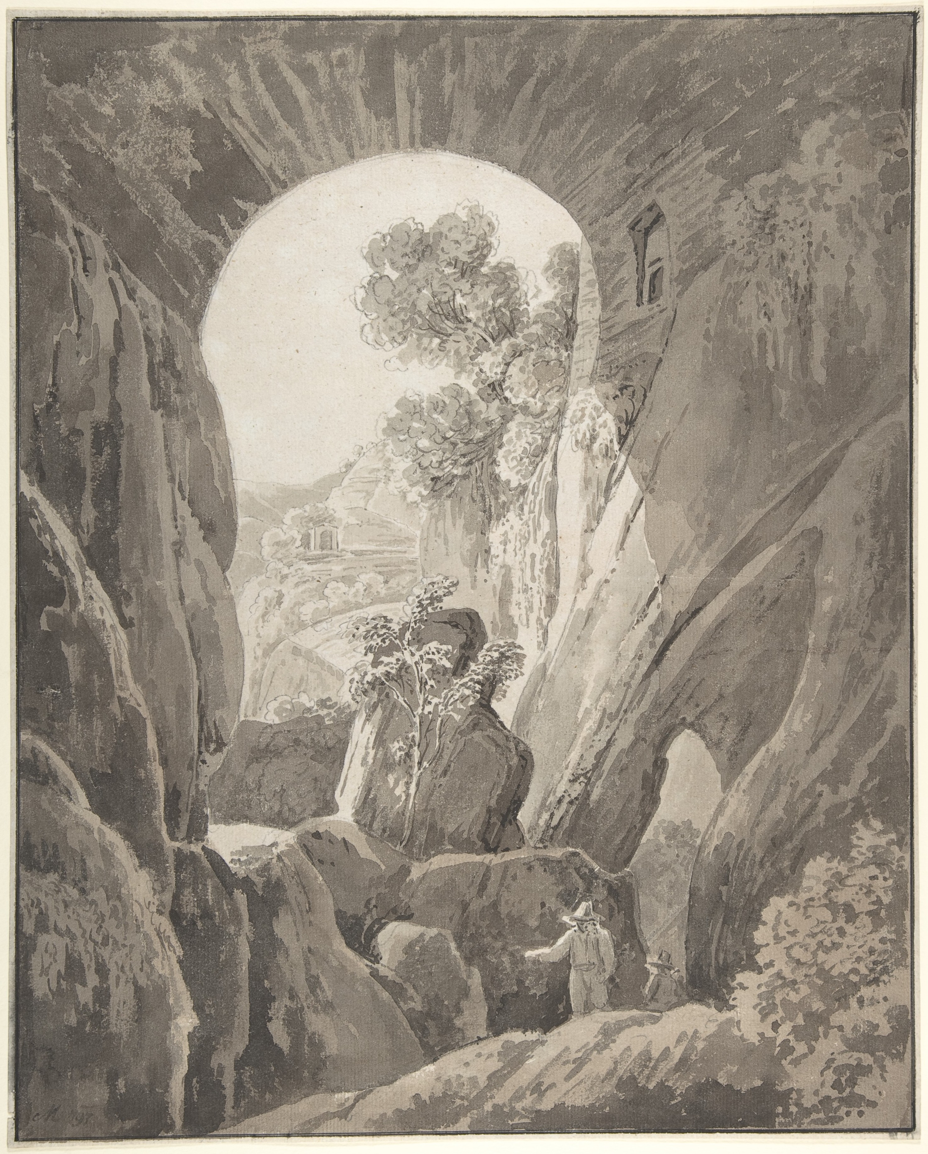 Drawing; Drawings